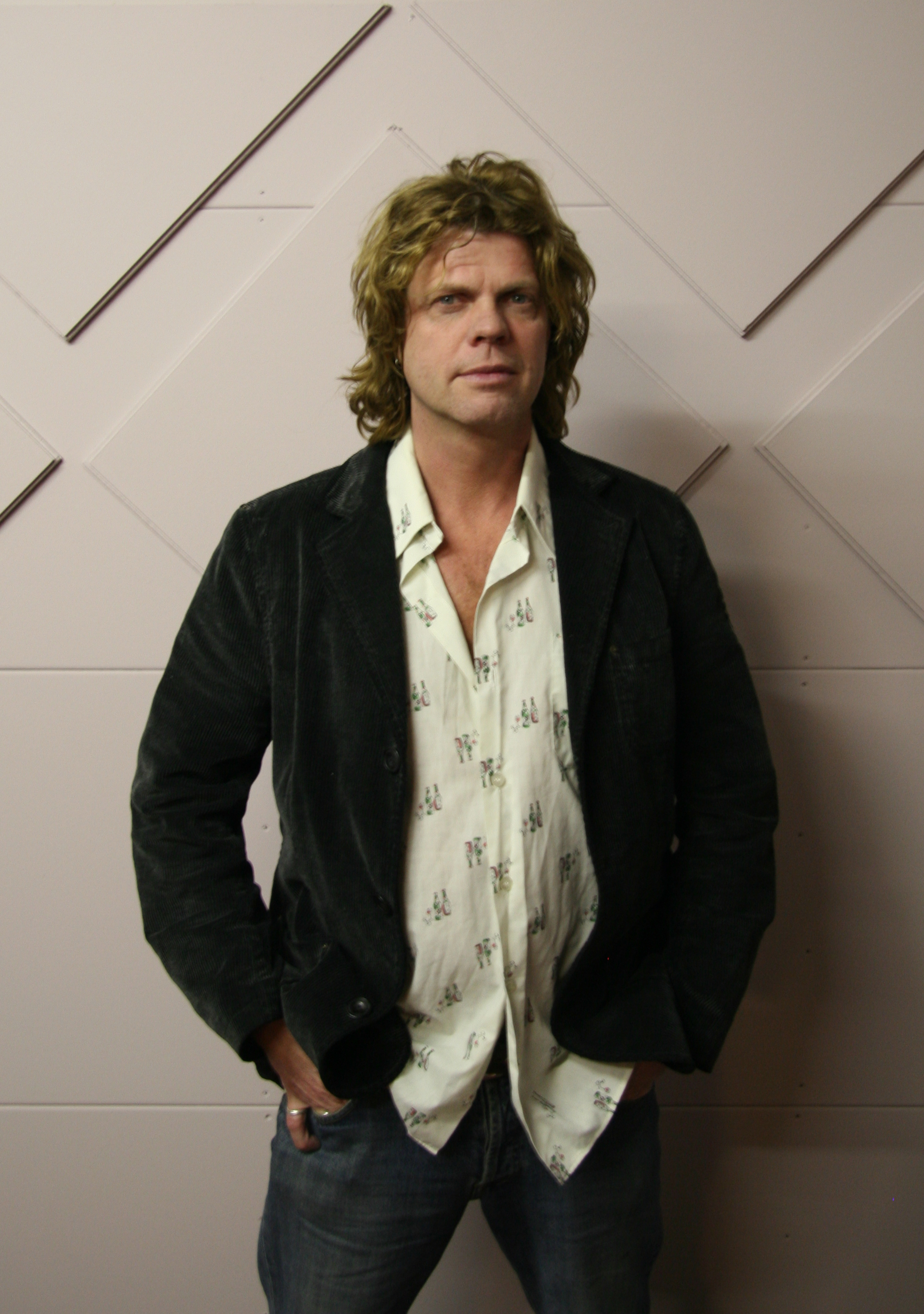 Toni Peroni, Dutch drummer